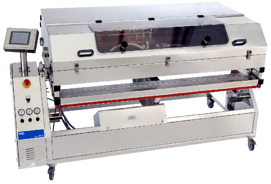 BioWave 200SPS